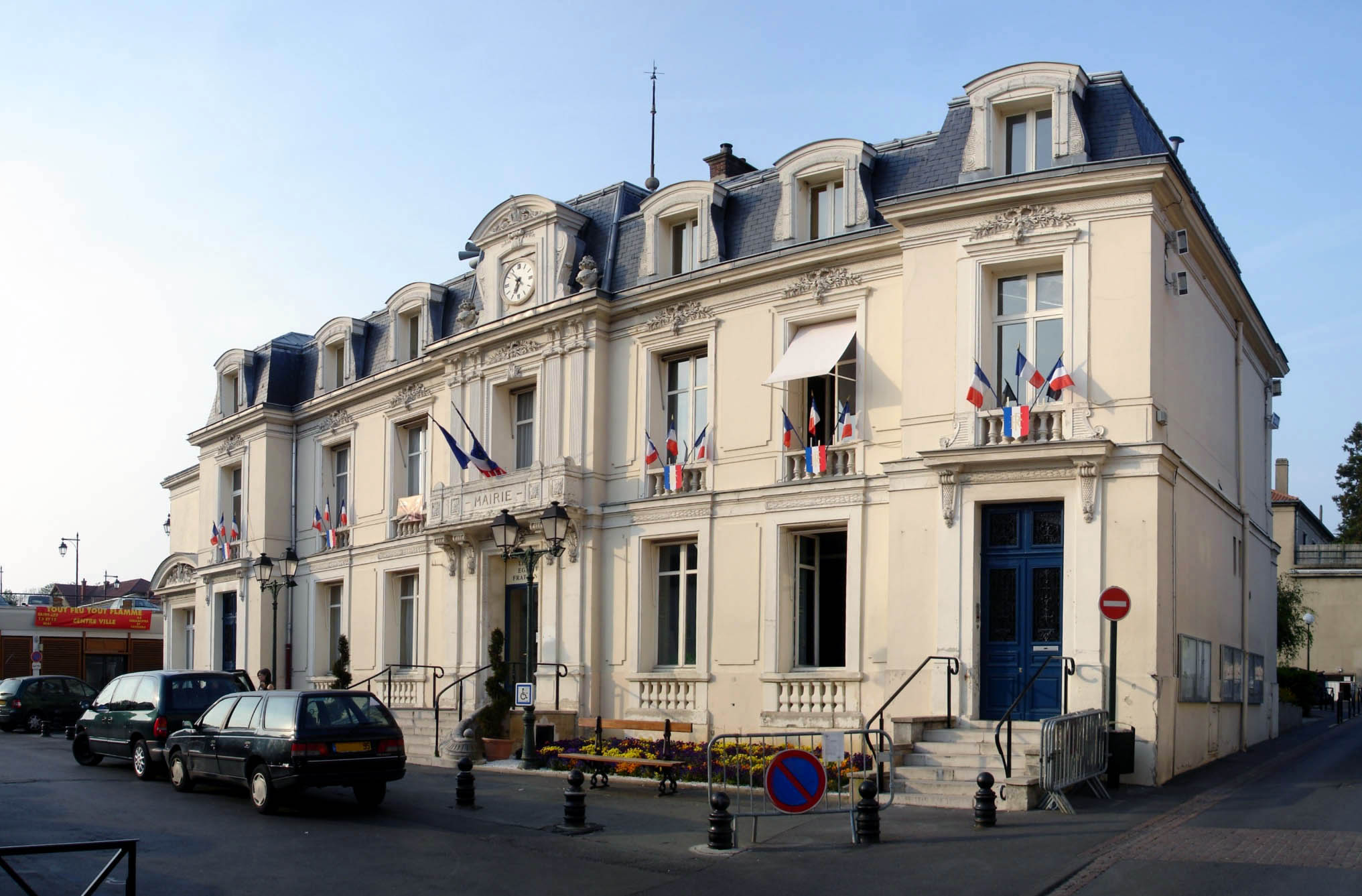 Mairie de Saint-Leu-la-Forêt (Val-d'Oise), France